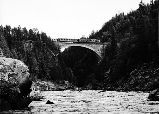 Dubleringstog, hurtigtog 1202, passerer Orkla bru